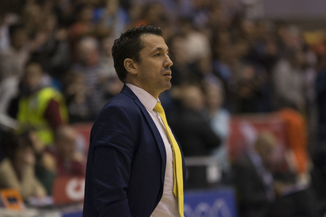 Gonzalo Gª durante un encuentro con Club Ourense Baloncesto